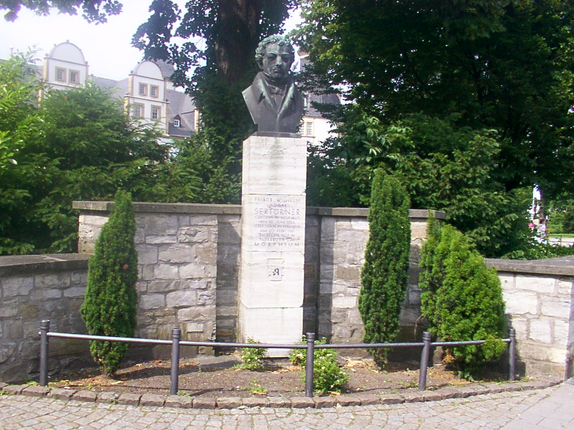 Denkmal des Friedrich Sertürner, vor dem Schlosspark in seinem Geburtsort Schloß Neuhaus, NRW, Germany